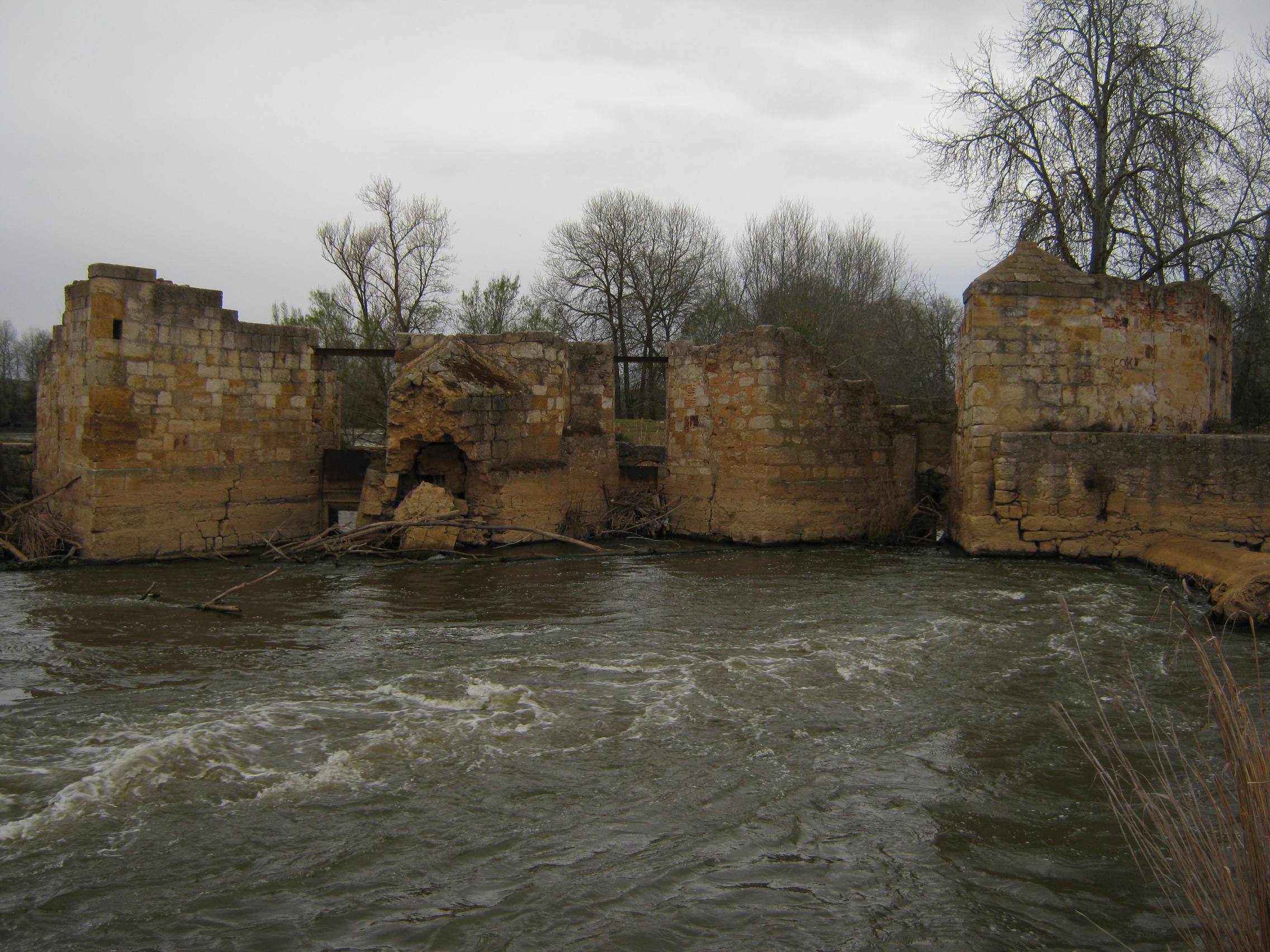 Vista de las aceñas de Gijón, en la ciudad de Zamora